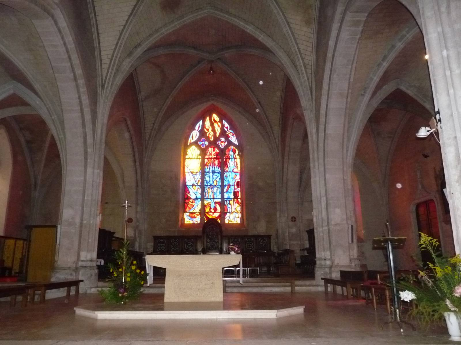 église de Ruffec, Charente, France